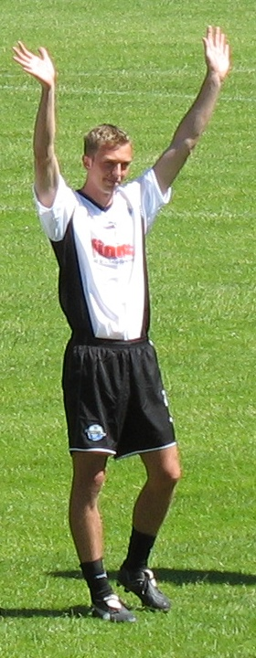 Stephan Maaß, Spieler beim SC Paderborn 07